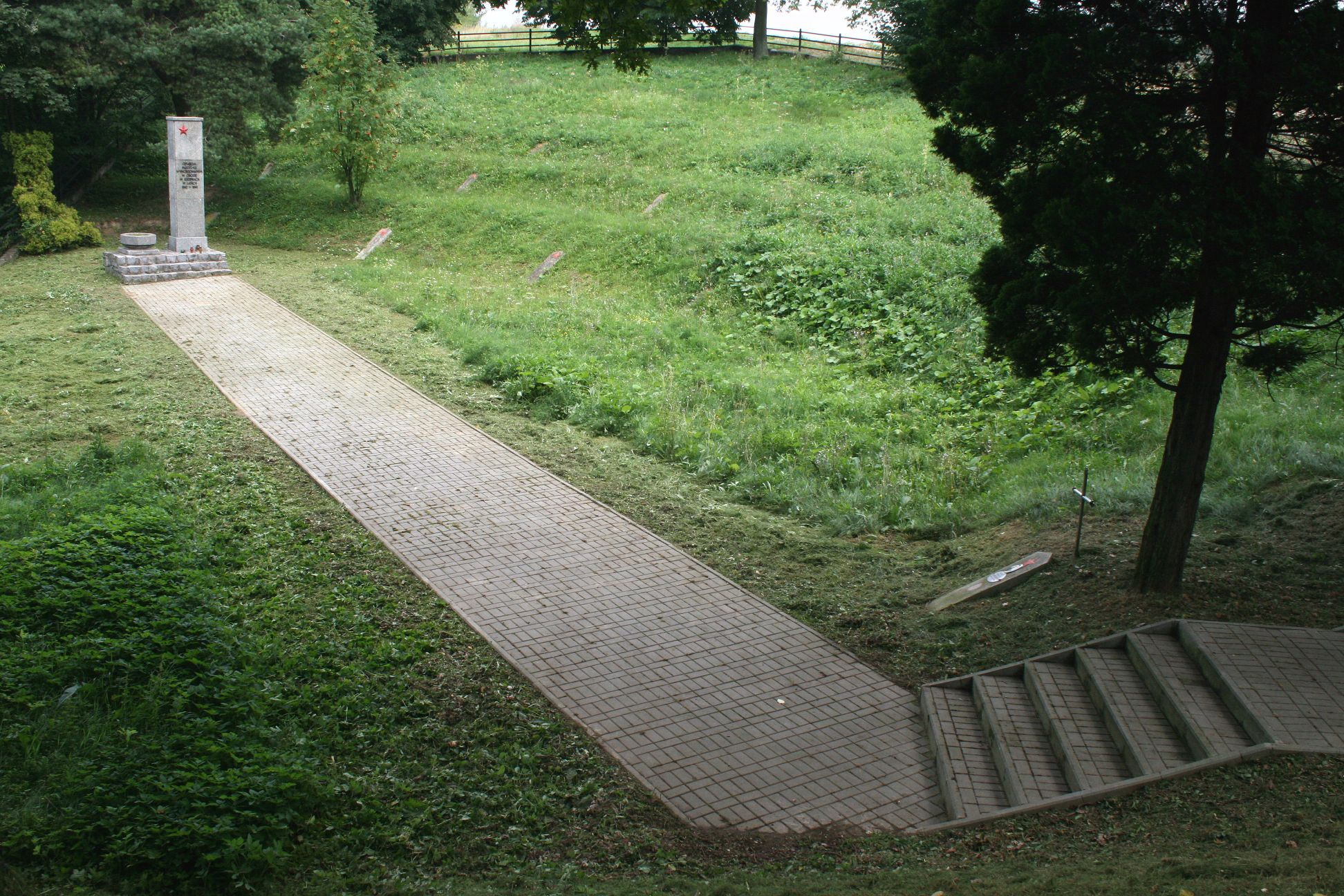 Widok ogólny na cmentarz w Bierówce (tzw. Bierowskie Doły), gdzie pochowane zostały ofiary obozu niemieckiego w Szebniach